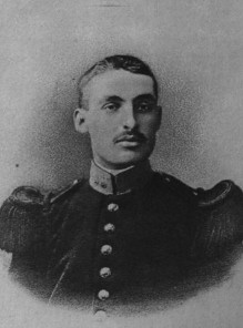 Portrait de Xavier de Curières de Castelnau (1892-1914)